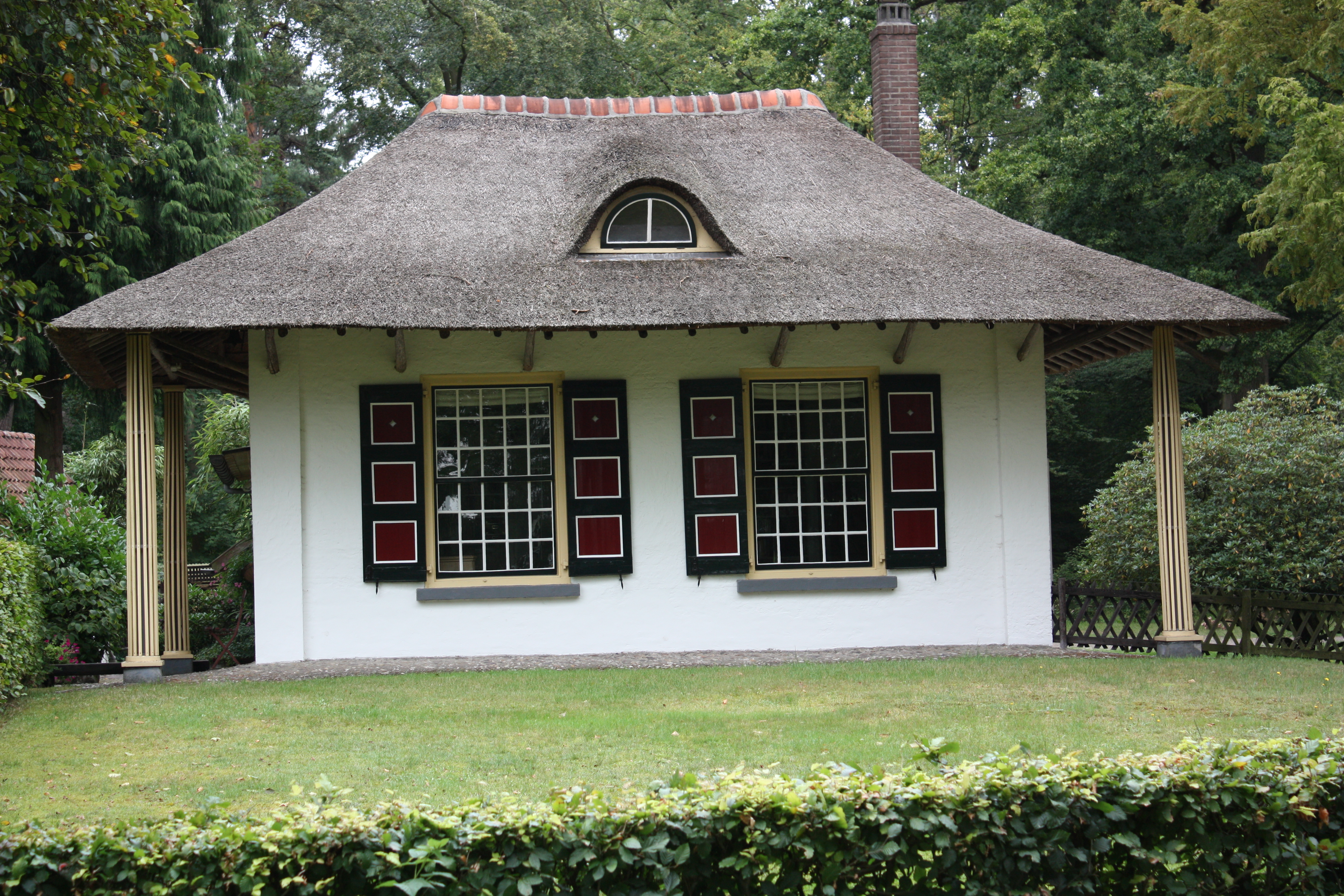 tuinmanswoning bij buitenplaats den treek